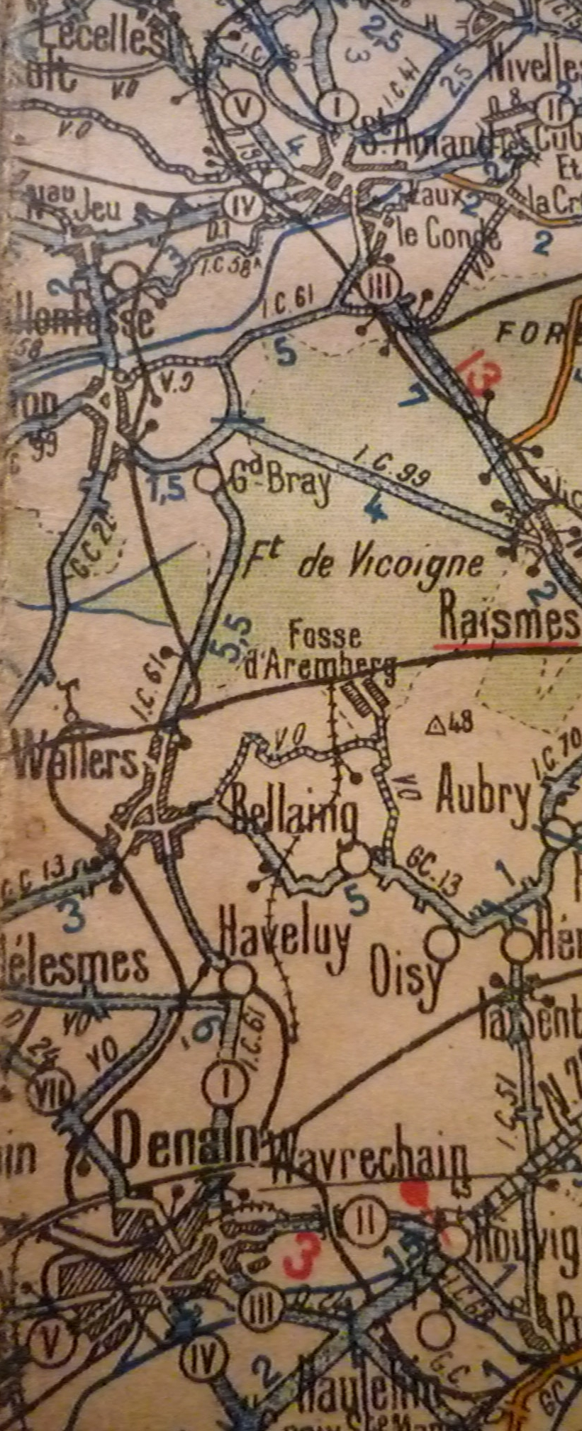 Tracé de l'ancienne Ligne Denain - Saint-Amand-les-Eaux, Nord-Pas-de-Calais, France